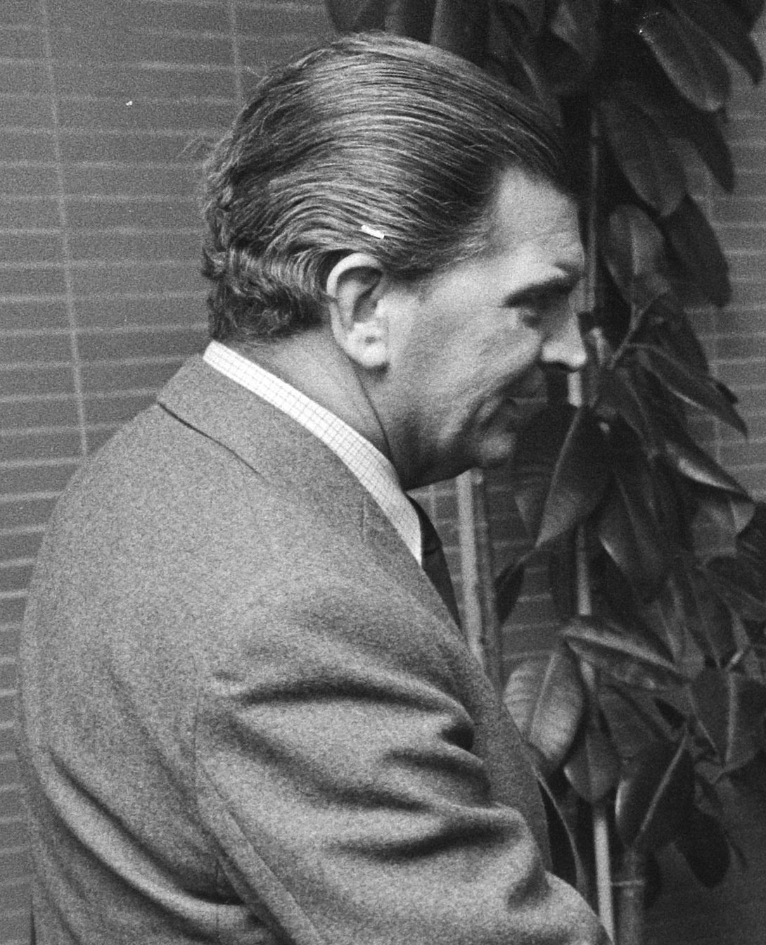 Delegatie Zuid Molukkers praat in Krimpen a/d IJssel met burgemeester Bulder; Bulder begroet Zuidmolukse vertegenwoordiger